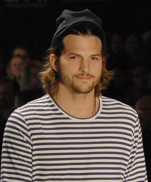 Foto: Marcos Madi